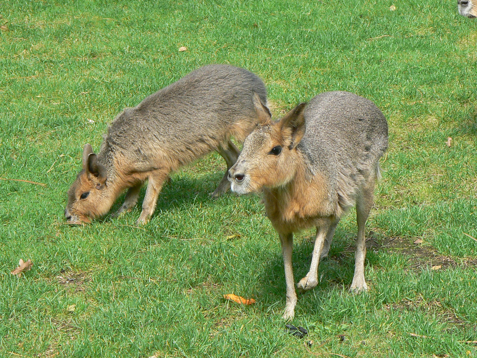 Dolichotis patagonum / Mara / Patagonian cavi / pampashase